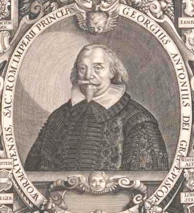 Georg Anton von Rodenstein (1579-1652), Bischof von Worms